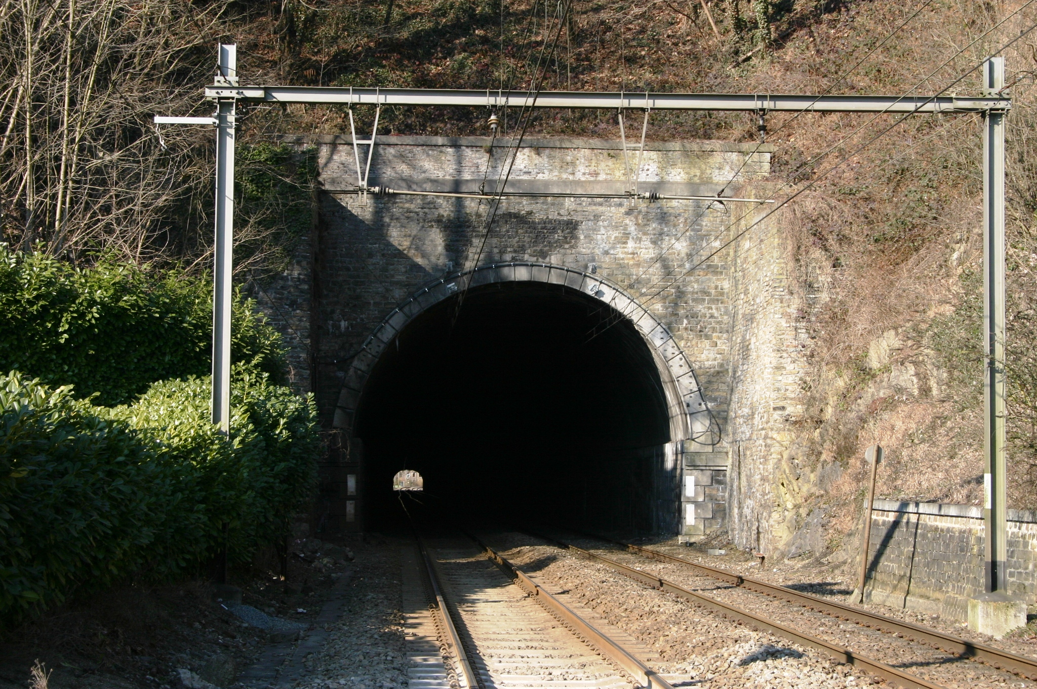 Tunnel vun Esneux vun der Gare vun Esneux aus gesinn.